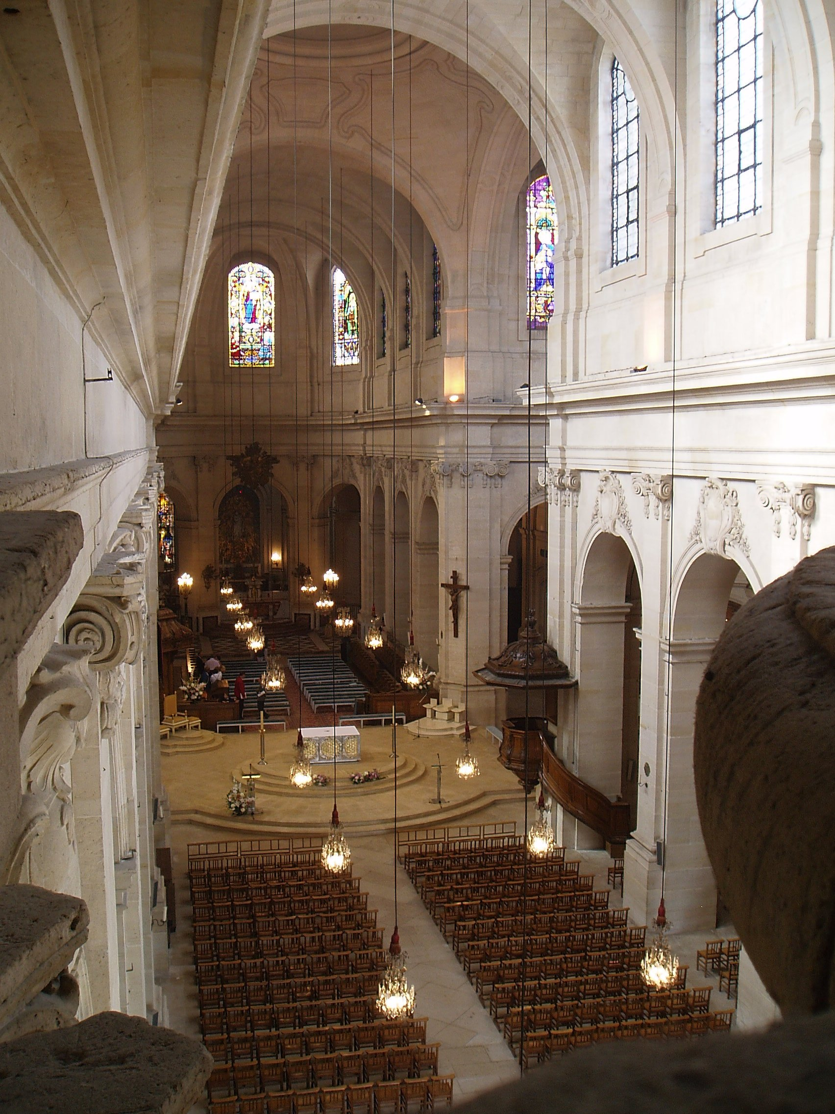 Cathédrale Saint Louis de Versailles Architecte : Jules Hardouin Masart de Sagonne Construction : 12 juin 1743 Inauguration : 24 août 1754 consacrée cathédrale en 1843